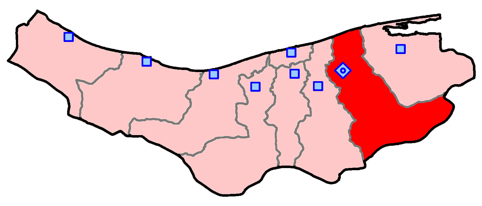 حوزهٔ انتخاباتی ساری و میاندورود برای انتخابات مجلس شورای اسلامی